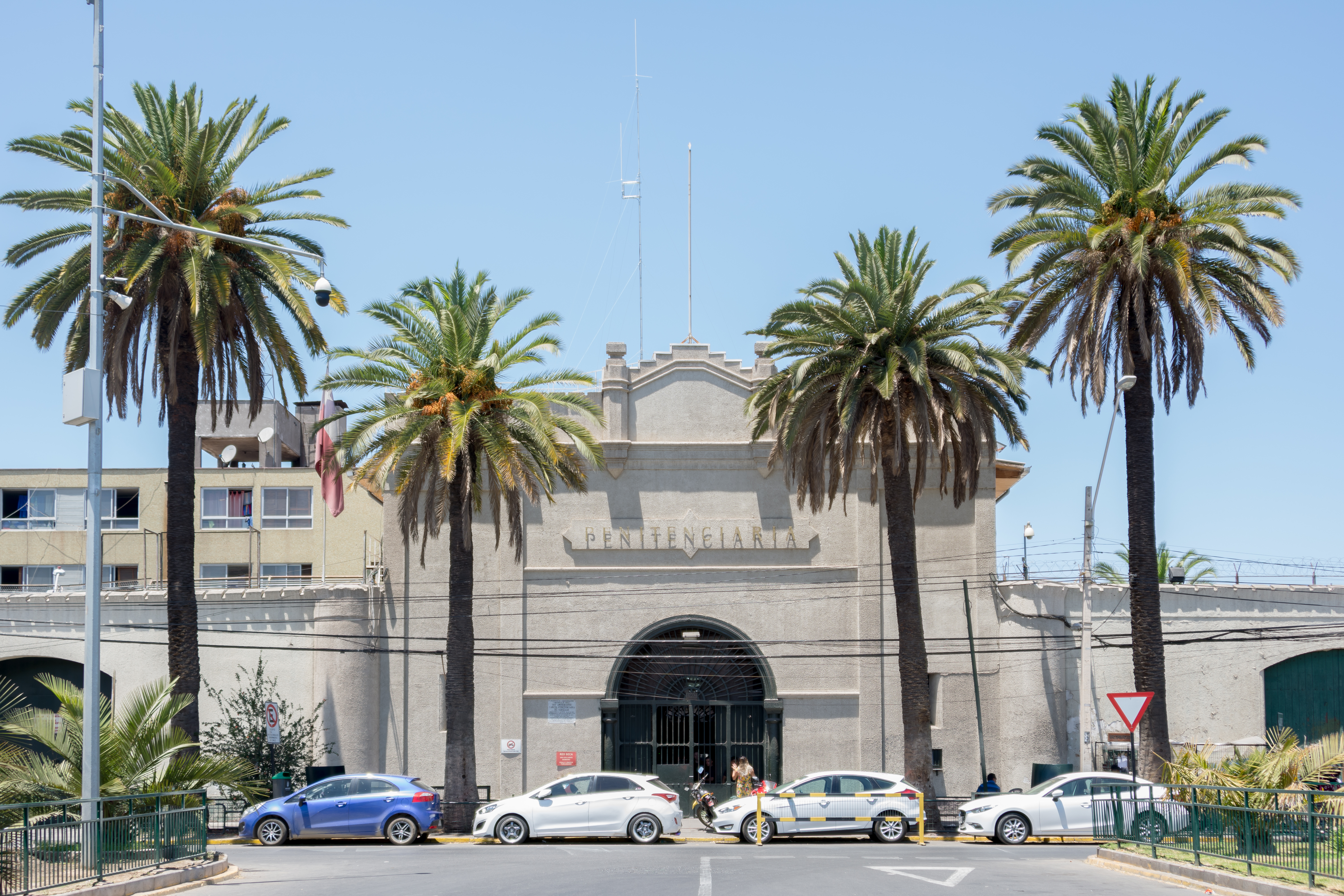 Penitenciaría, Santiago, Región Metropolitana de Santiago, Chile